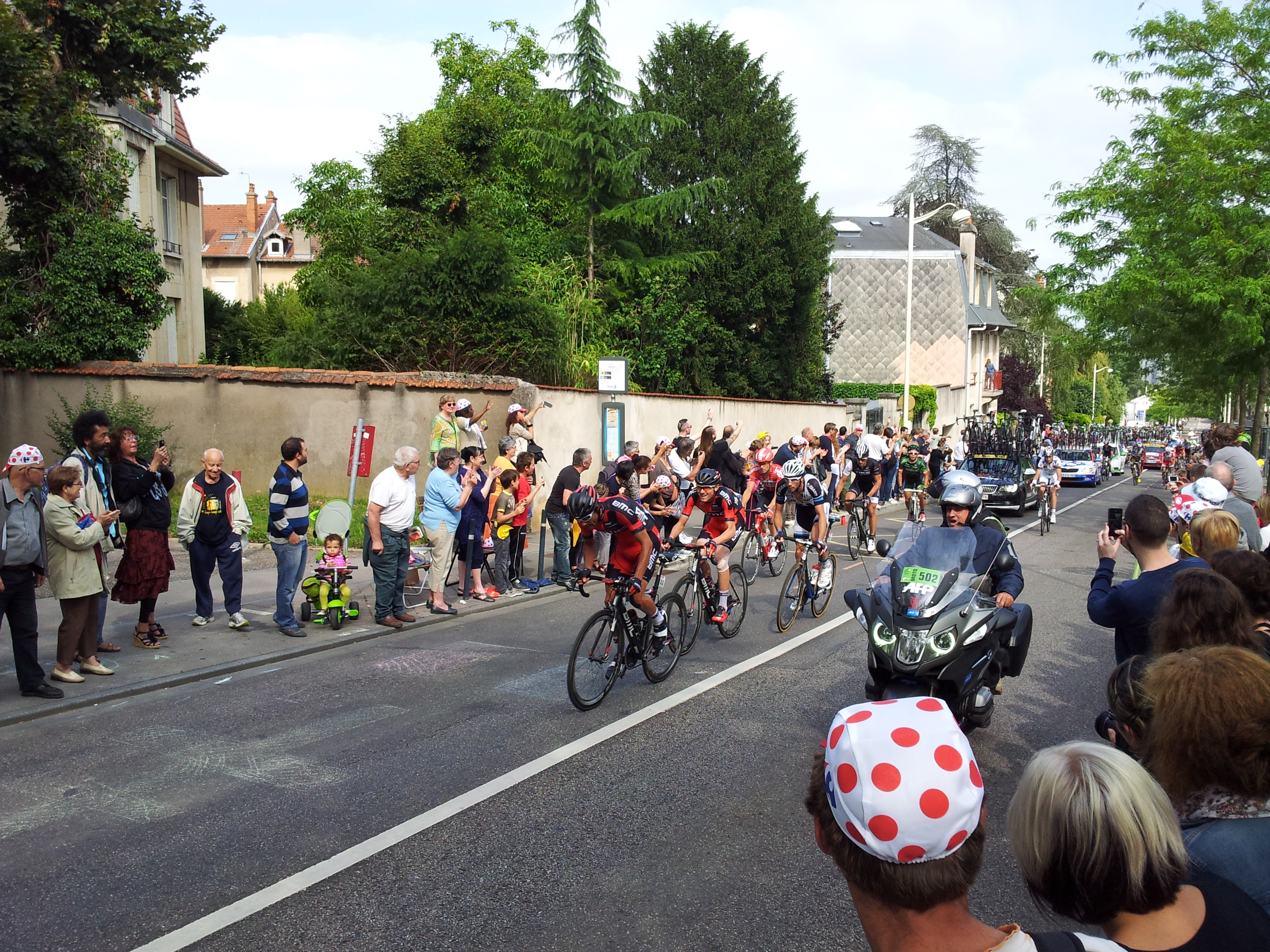 7e étape du Tour de France 2014 au début de la côte de Boufflers.